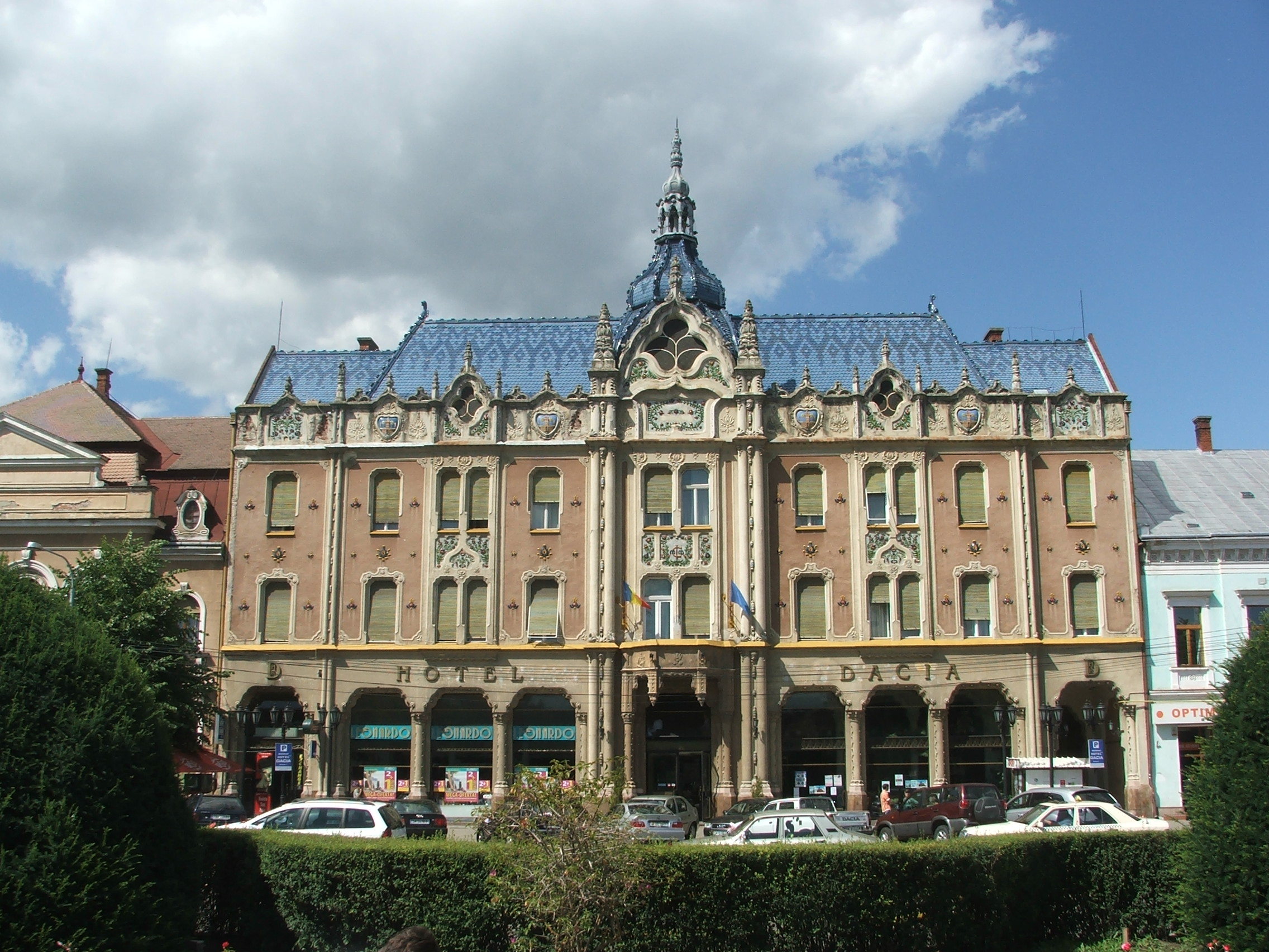 Szatmárnémeti, Pannónia szálló (Dacia hotel)